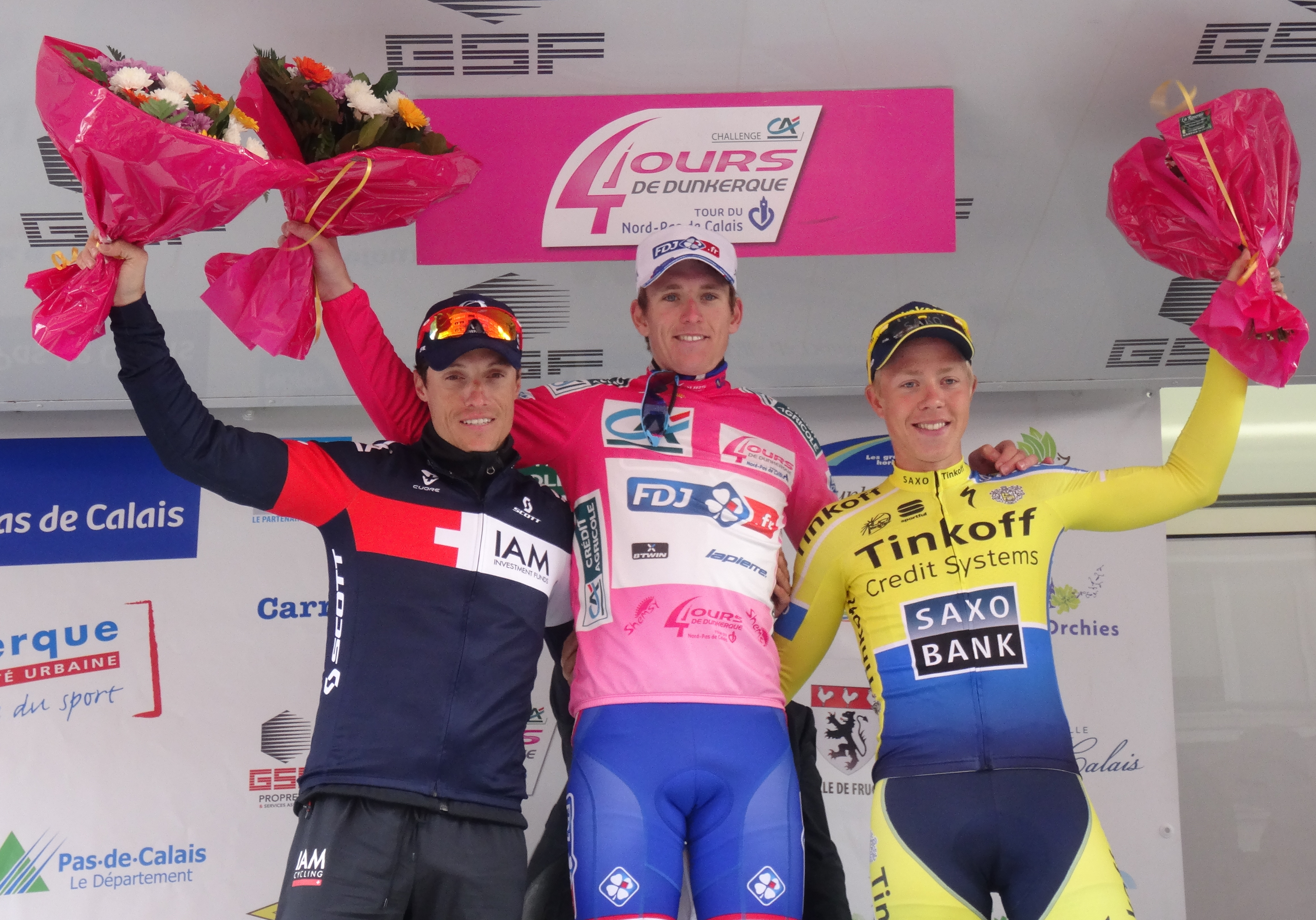 Reportage photographique réalisé le dimanche 11 mai 2014 à l'arrivée de la cinquième et dernière étape de l'édition 2014 des Quatre jours de Dunkerque à Dunkerque, Nord, Nord-Pas-de-Calais, France. Depicted people: Sylvain Chavanel, Arnaud Démare and Michael Valgren Depicted team: IAM, FDJ.fr, Tinkoff-Saxo